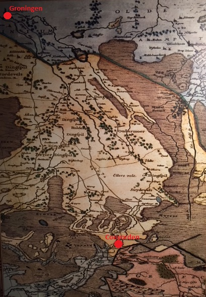 Goede weergave van de ligging van Coevorden tussen het hoogveen.